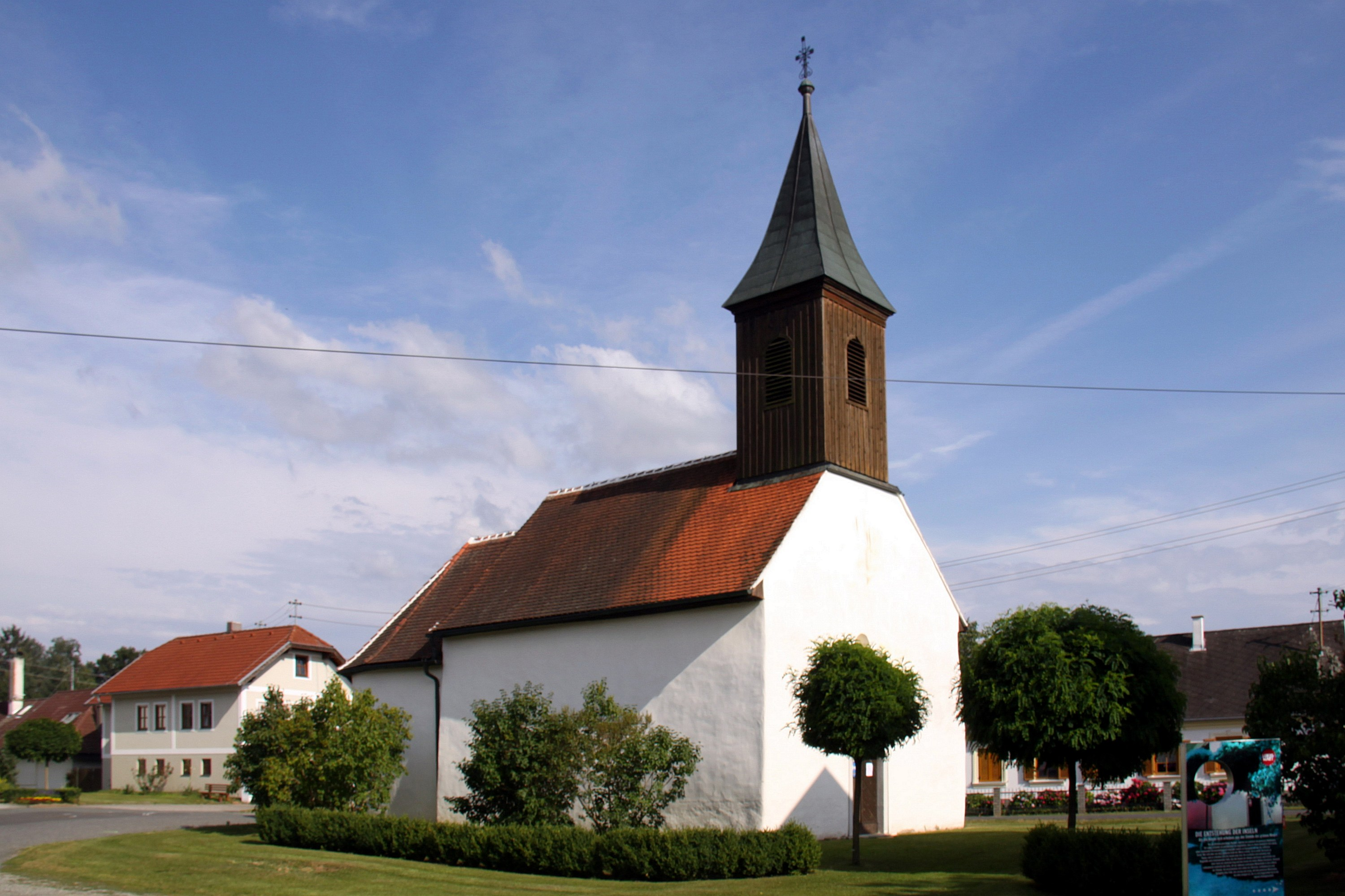 Denkmalgeschützte römisch-katholische Filialkirche in Siget in der Wart, Gemeinde Rotenturm an der Pinka Object location47° 15′ 39.95″ N, 16° 16′ 48.31″ E